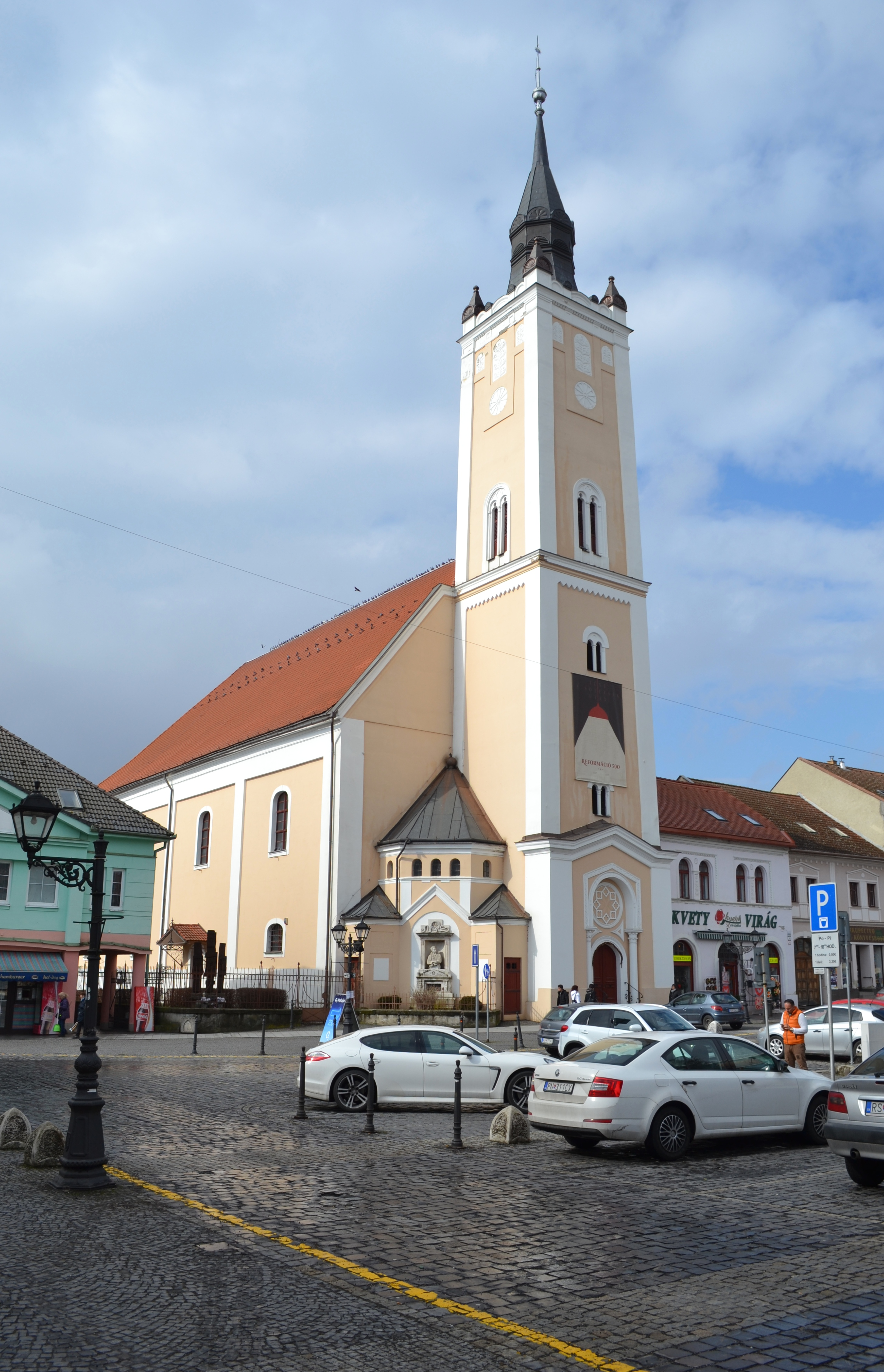 Rimavská Sobota, kostol reformovanej cirkvi pochádzajúci z roku 1784.